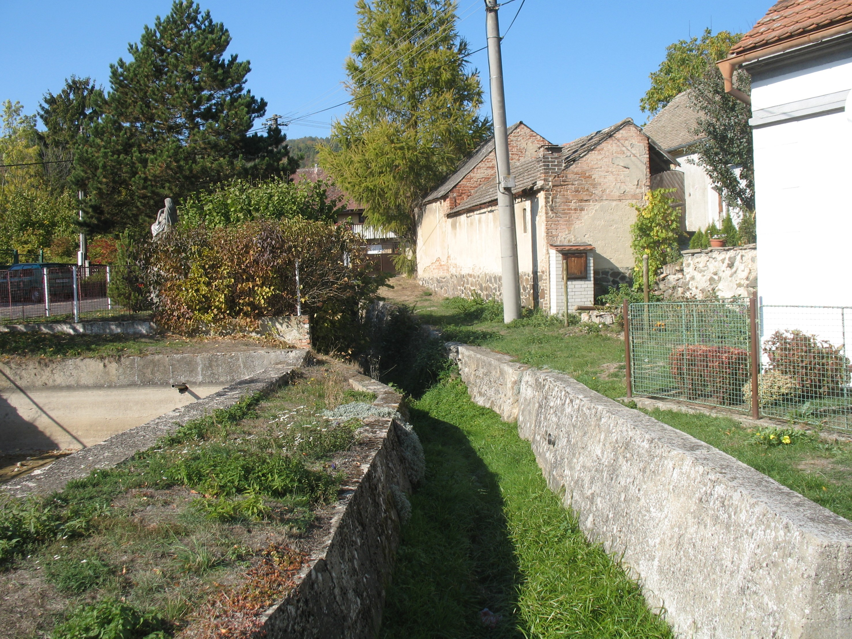 Kuzovský potok ve Starém, okres Litoměřice